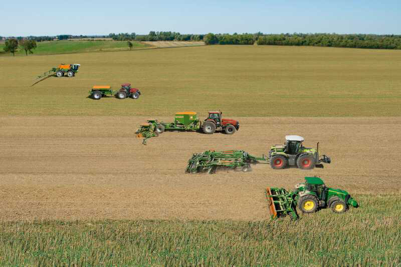 Mit ihrem Maschinenprogramm verknüpft die Amazone GmbH & Co. KG die Arbeitsschritte Bodenbearbeitung, Saat, Düngung und Pflanzenschutz. – Von vorne nach hinten: John Deere 8530 mit Amazone-Kompaktscheibenegge Catros, Claas Xerion mit Amazone-Grubber-Scheibeneggen-Kombination Centaur 5001 Super, Case MX270 mit Amazone-Sämaschine EDX 9000-T, Case MXU135 mit Amazone-Großflächenstreuer ZG-B, selbstfahrende Pflanzenschutzspritze Amazone SX 4000.